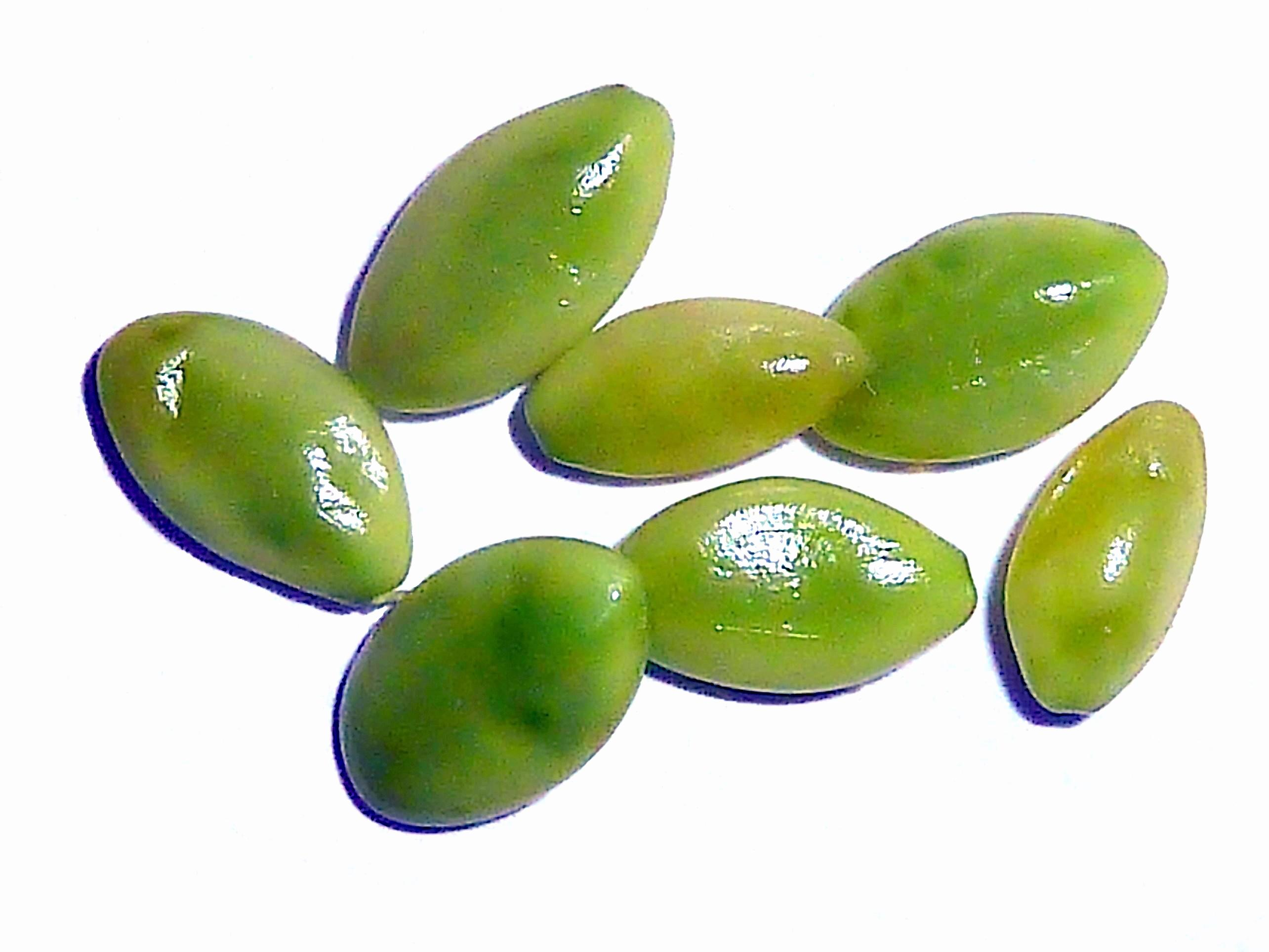 Albizia julibrissin (Acacia de Constantinopla) : Semillas inmaduras; apenás se adivina la "linea fisural" - Ornamental, Plaza de Cibeles,Madrid Capital (España).